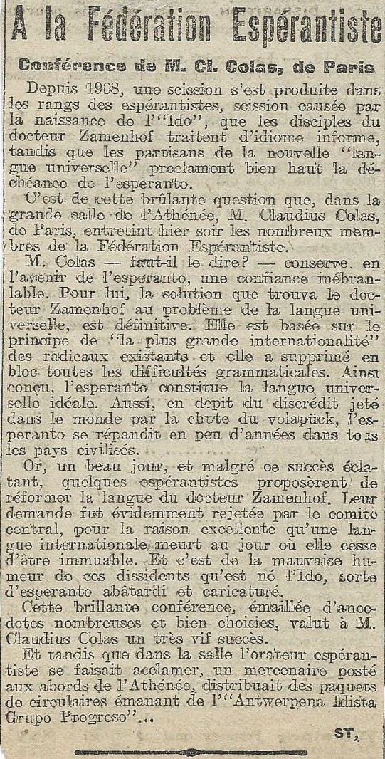 Artikolo pri Esperanto-Ido; konferenco Claudius Colas en Antverpeno proksimume en 1910